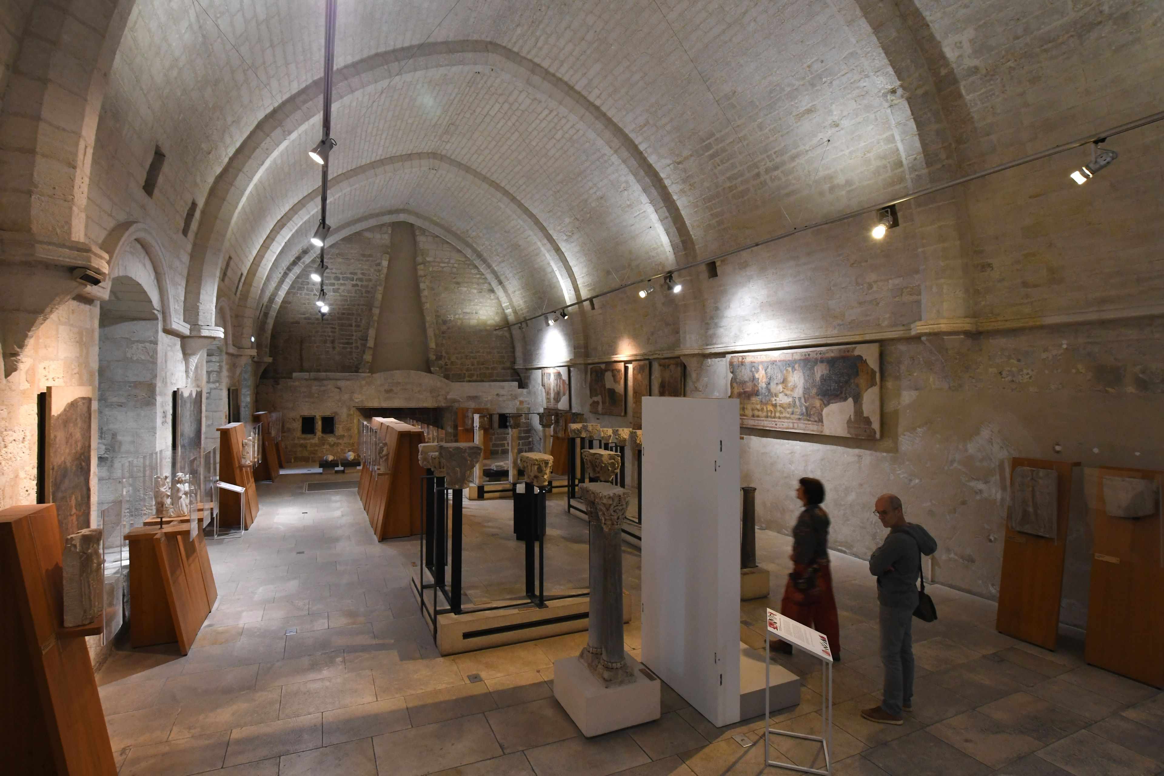 Avignon, Musée du Petit Palais